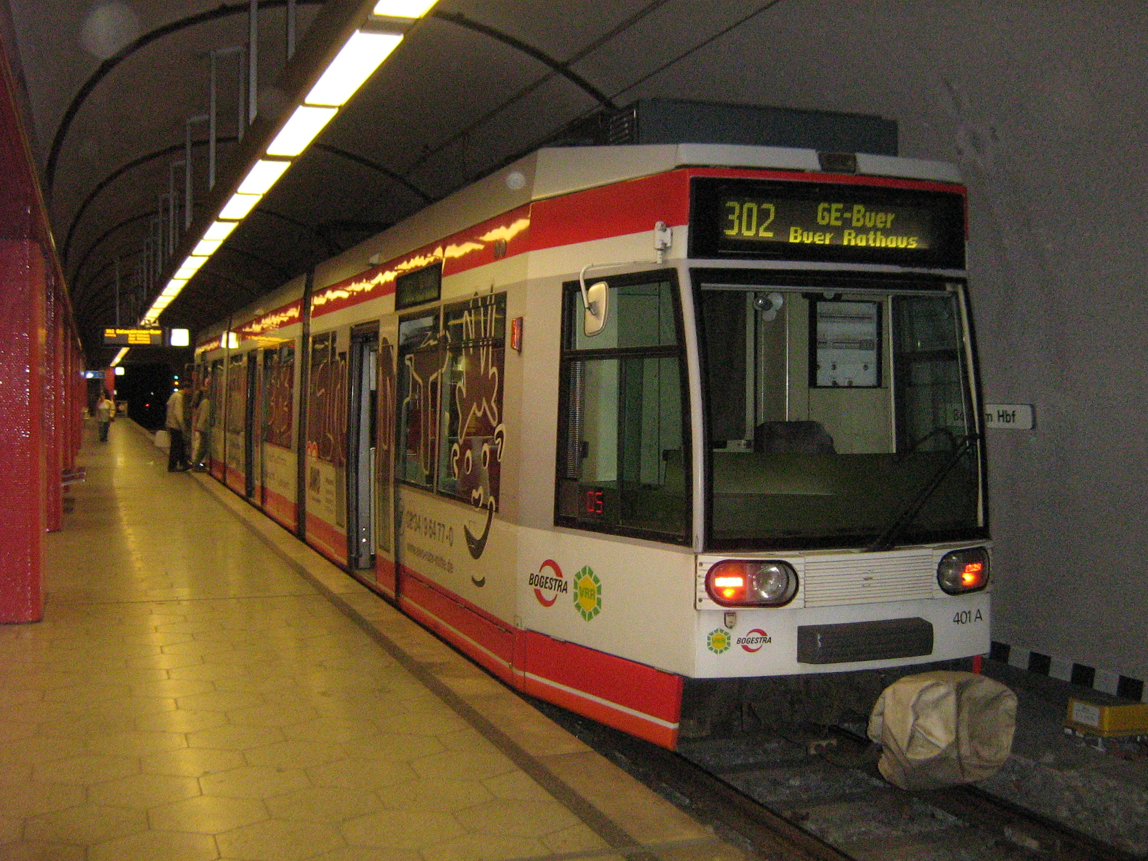 Ein NF6D der Bogestra auf der Linie 302 in Fahrtrichtung Gelsenkirchen-Buer, Buer Rathaus. Der Fahrgastwechsel ist abgeschlossen und das Fahrzeug setzt sich in Bewegung. In 550 Metern ist der Bahnhof Bochum-Rathaus (Süd) erreicht.